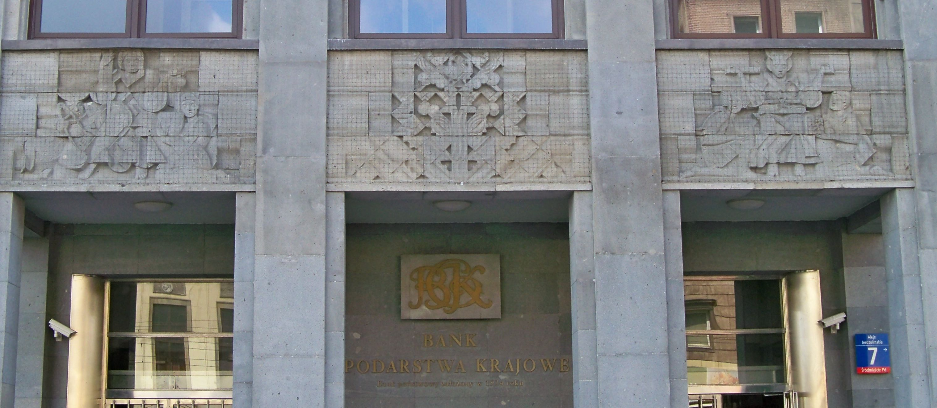 Płaskorzeźby nad wejściem do Banku Gospodarstwa Krajowego w Warszawie (róg Alej Jerozolimskich i Nowego Światu) wraz z logiem banku.